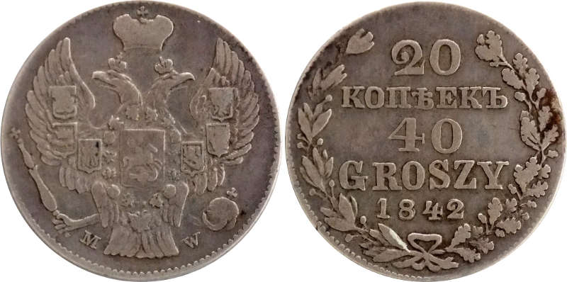 20 kopiejek40 groszy 1842